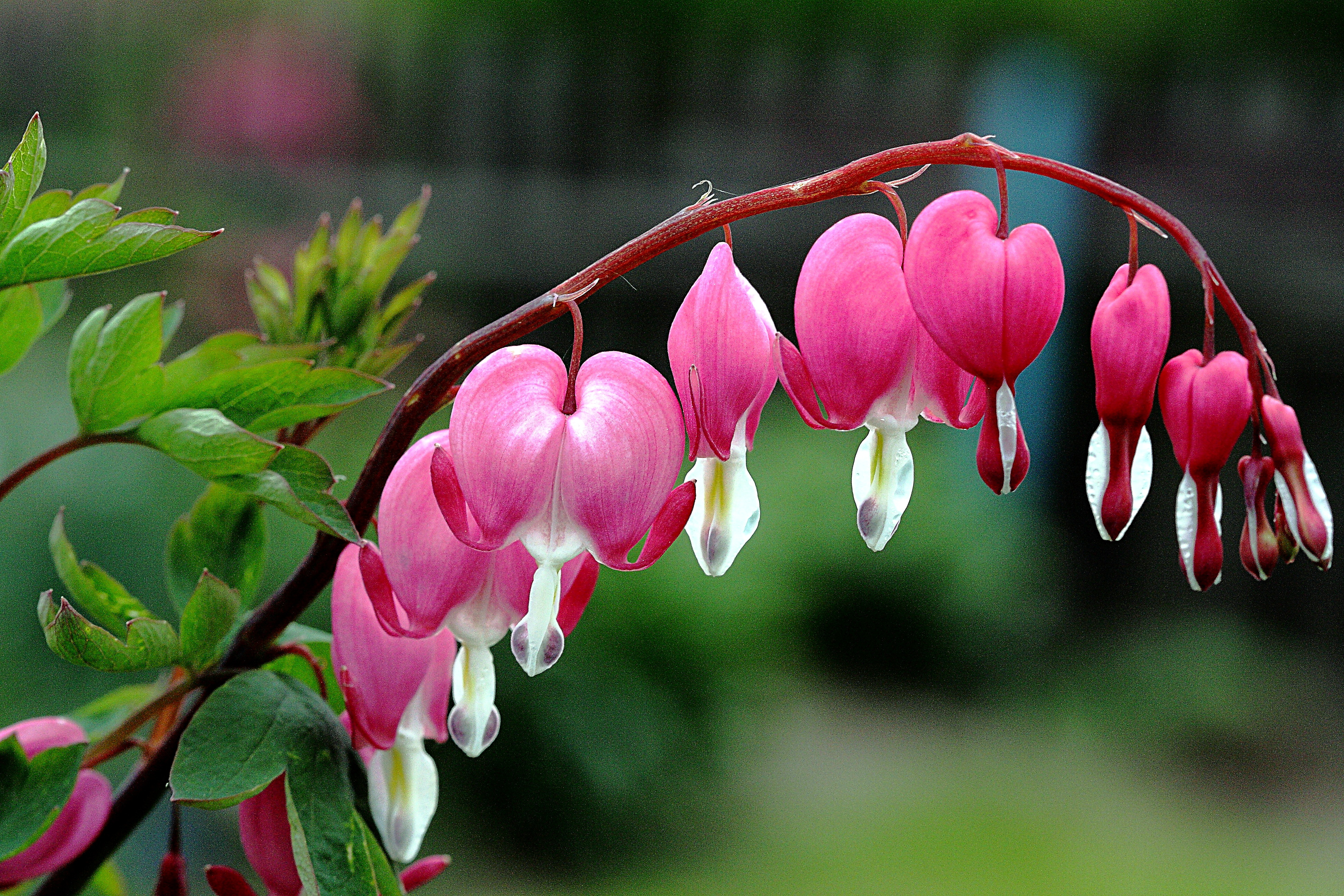 Tränendes_Herz